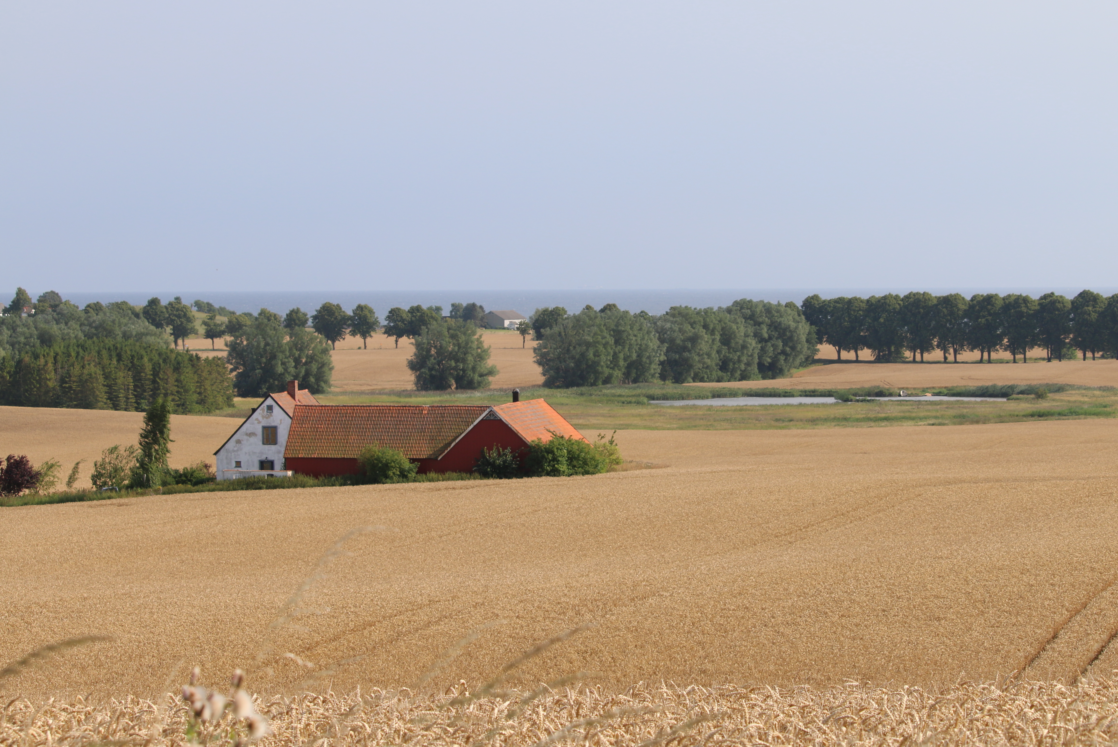 Vy från Skårby, Ystads kommun